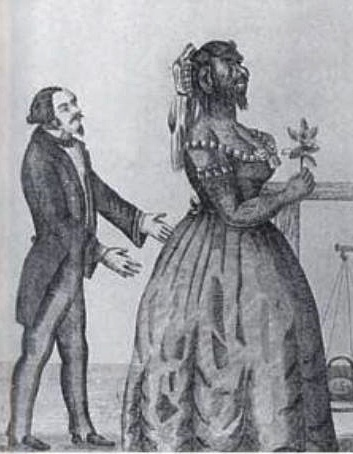 Julia Pastrana mit ihrem Impressario Theodore Lent